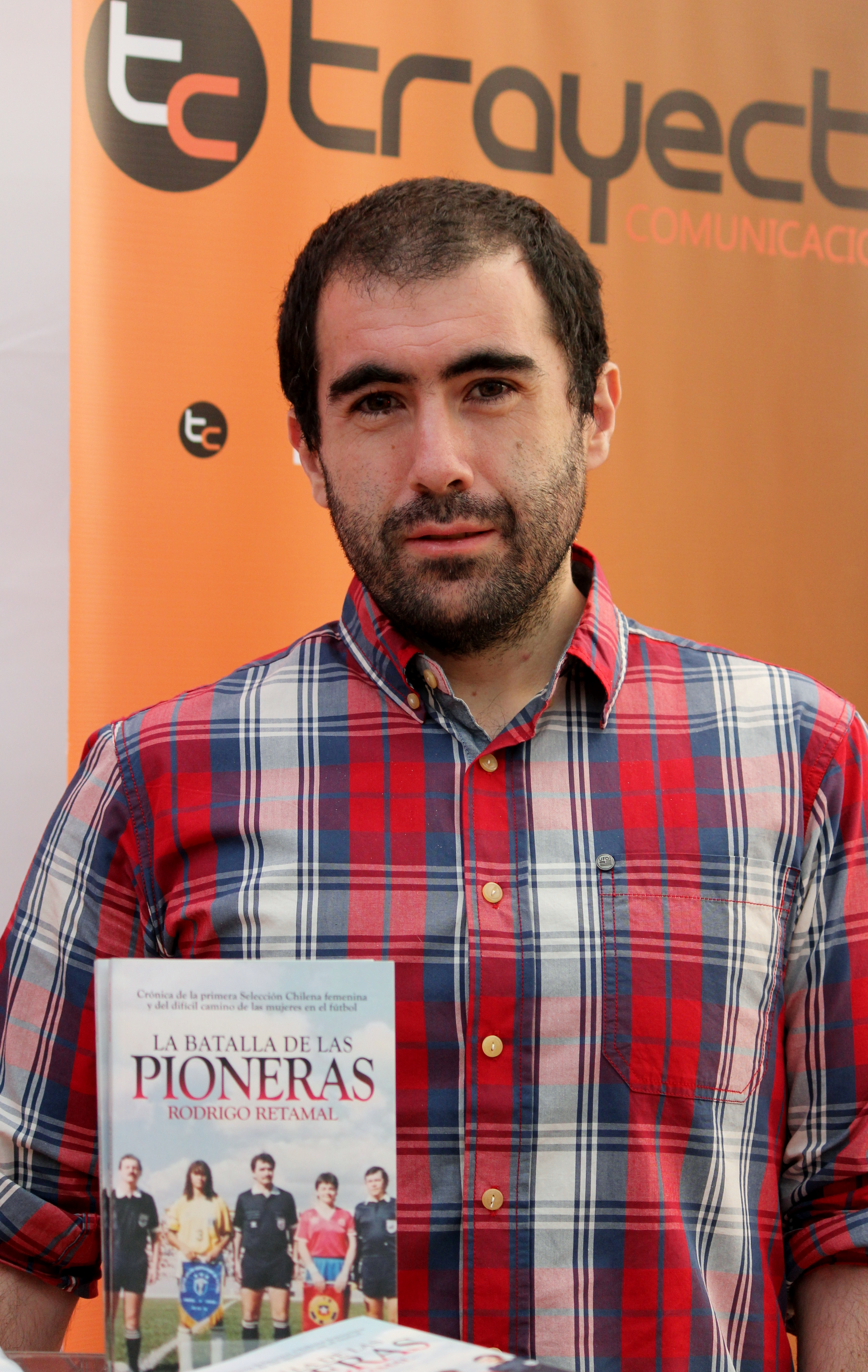 El periodista chileno Rodrigo Retamal, autor del libro sobre la primera selección nacional de fútubol femenino La batalla de las pioneras en la Feria Internacional del Libro de Santiago 2018.